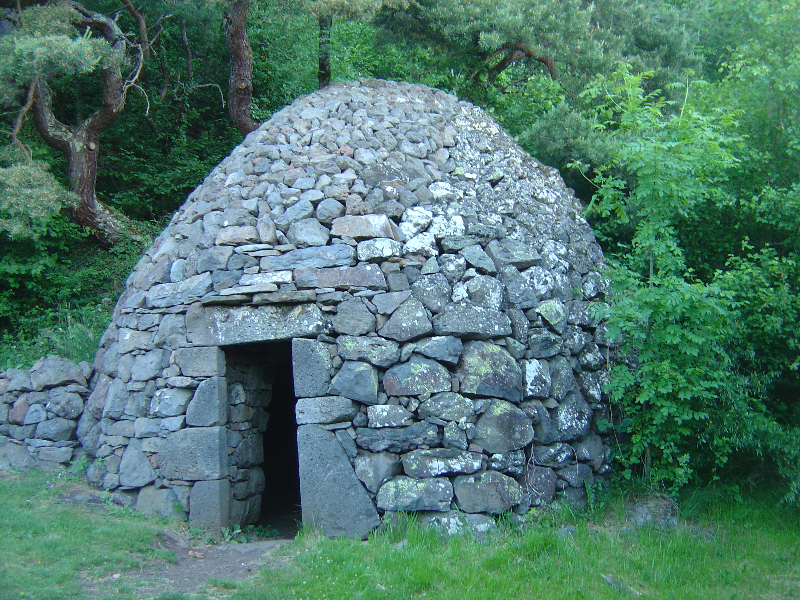 Cabane en pierre sèche à la toiture refaite (tsabone sous son appellation vernaculaire, chibotte sous son appellation touristique) au lieudit Les Vigneaux à Vals-près-le Puy (Haute-Loire, 43)